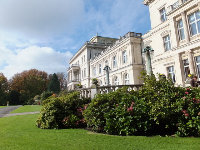 ビラヒューゲル クルップ